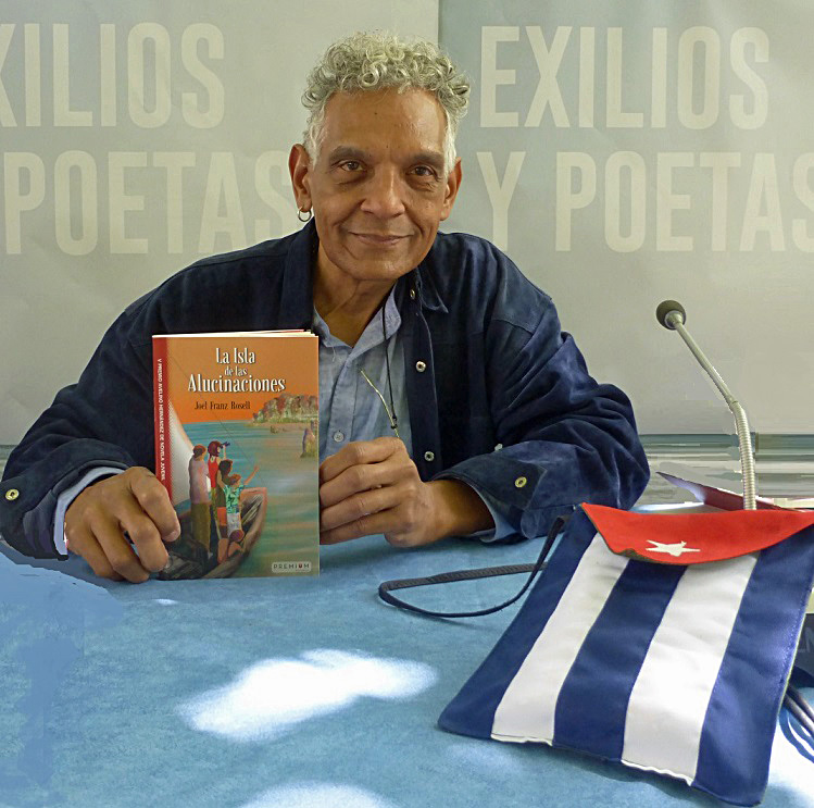 LA ISLA DE LAS ALUCINACIONES, Premio Avelino Hernández de Novela Juvenil 2016 fue publicada en julio de 2017 por la editorial Premium (Sevilla) y presentada por su autor durante el festival de poesía de Soria, en agosto de ese año.